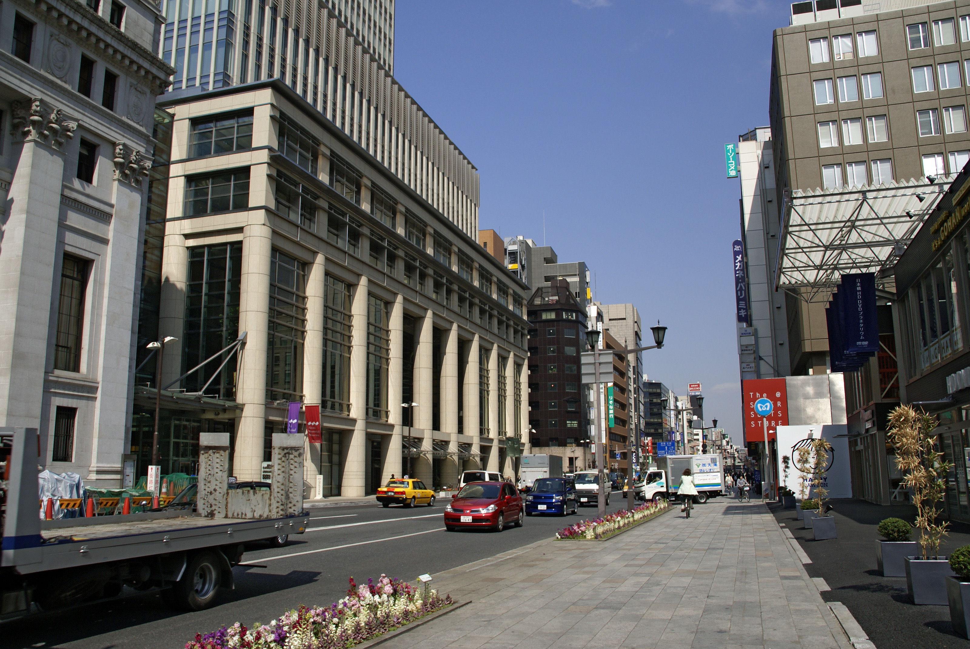 Nihonbashi Mitsui Tower in Chuo-ku, Tokyo, Japan